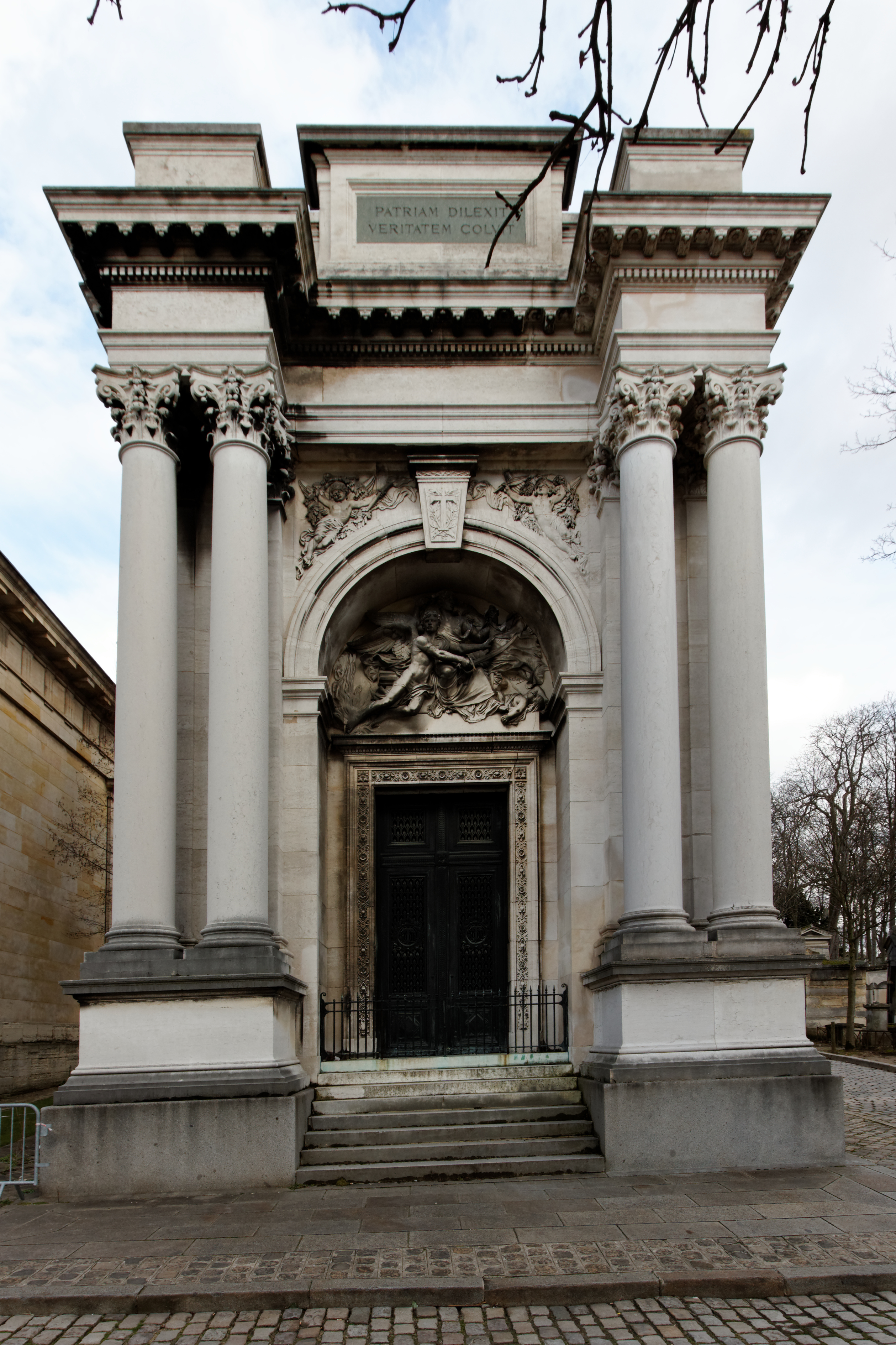 Sépulture de la famille Thiers dont Adolphe Thiers (1797-1877). Monument funéraire de l'architecte Aldrophe, orné d'un relief en marbre représentant le Patriotisme de Chapu et, à l'intérieur, d'une statue représentant l'Immortalité de Mercié. Concession de 152m². Initialement Adolphe Thiers a été enterré dans la chapelle Dosne-Thiers, avenue des Acacias, près de la tombe d'Étienne-Renaud-Augustin Serres.